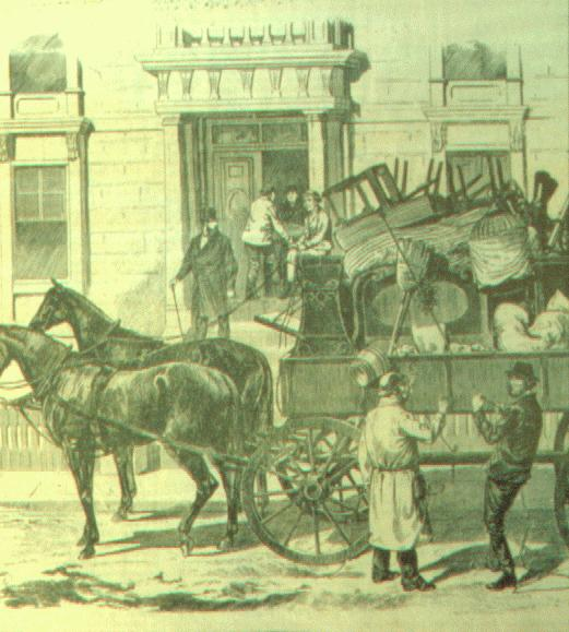 « Avec l'aide des chevaux », dessin tiré du Monde illustré, Montréal, année IV, no 157, 7 mai 1887, p. 1.